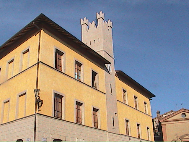 La facciata del Municipio di Trequanda, in provincia di Siena.